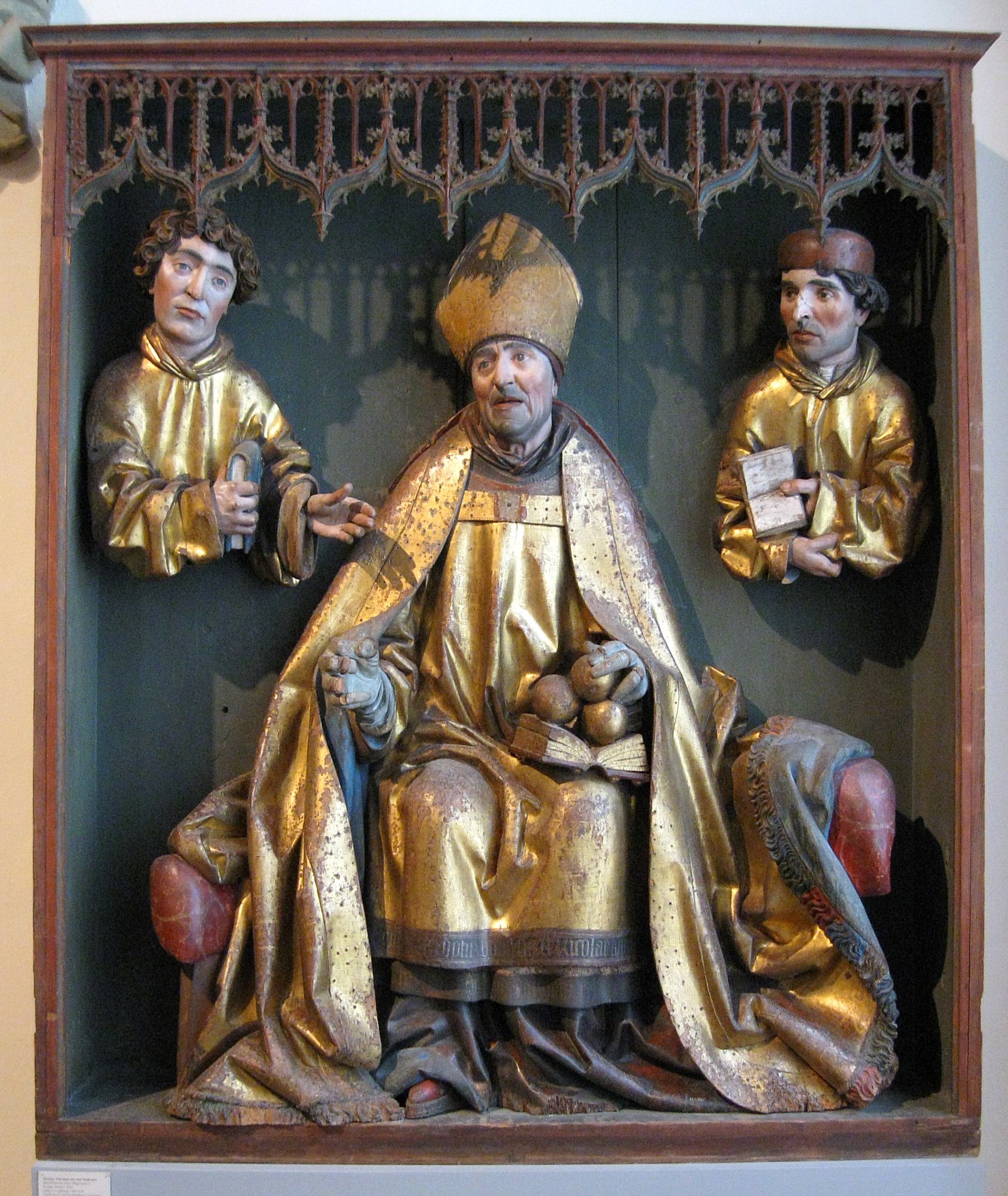 Gregor Erhart: Heiliger Nikolaus mit zwei Diakonen, 1501, Lindenholz mit ursprünglicher Farbfassung und Vergoldung, Bayerisches Nationalmuseum in München